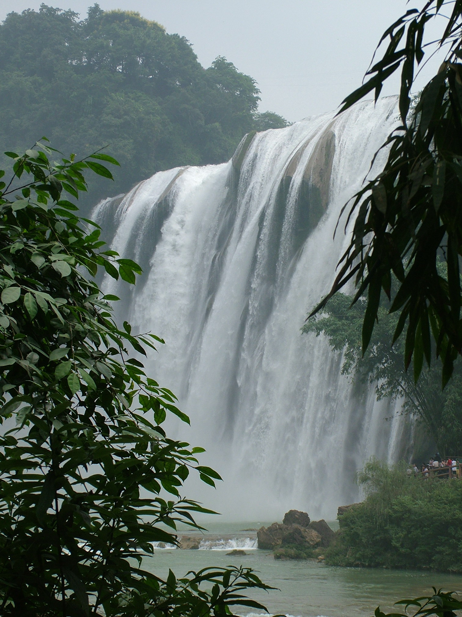 中国贵州黄果树瀑布